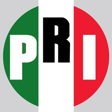 logotipo institucional del pri